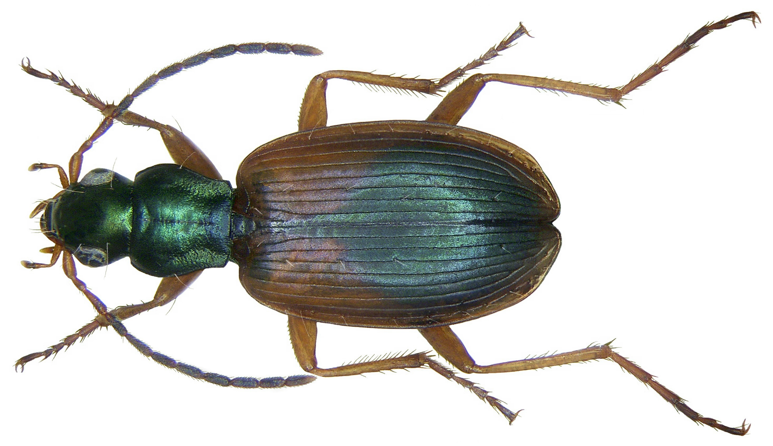 Familie: Carabidae Größe: 5,8-7,8 mm Verbreitung: Europa, Mittelasien Ökologie: in offenen Lebensräumen Fundort: Germania, Oberfranken, Selbitz leg. det. U.Schmidt, 2000 Foto: U.Schmidt, 2008